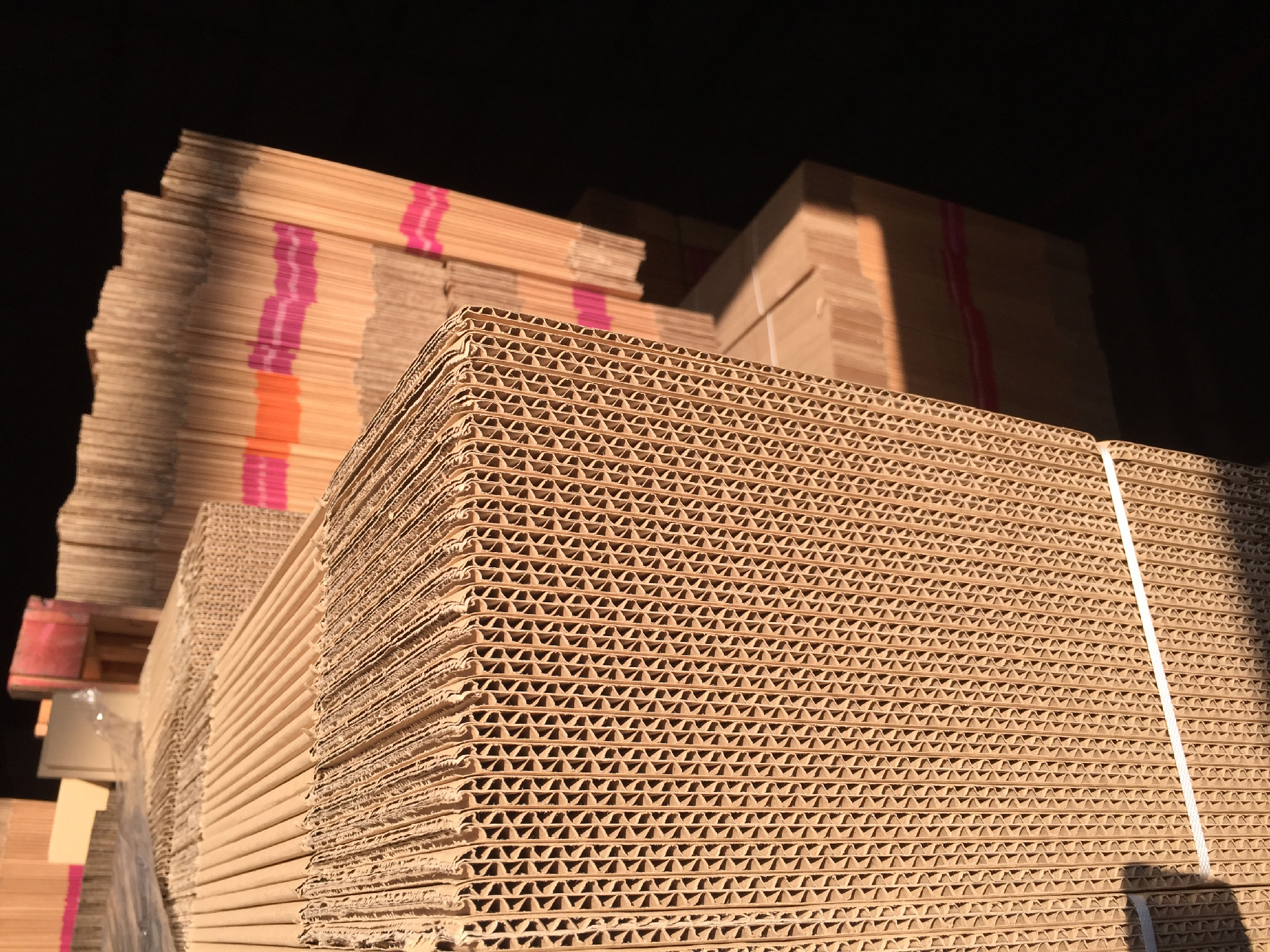 Palet de cajas de cartón apiladas